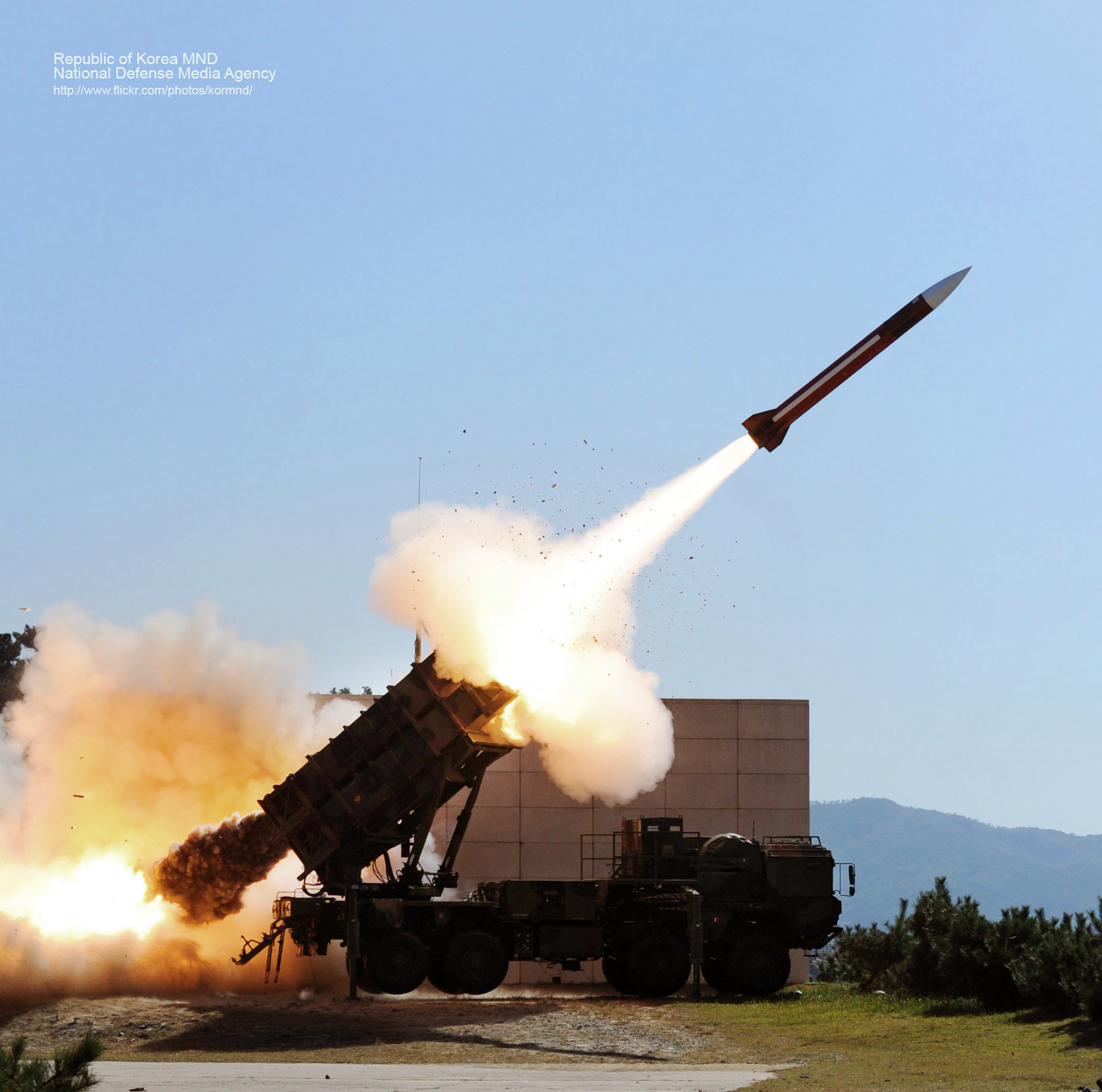 공군은 16일 오전 대천 대공사격장에서 열린 '방공유도탄 실사격 대회'에서 패트리어트 미사일을 성공적으로 발사했다. 이날 공군은 가상 적 항공기인 2대의 무인표적기에 패트리어트 미사일 2발을 발사해 모두 명중시켰다. 우리나라 공군의 패트리어트 미사일은 지난해 11월 전력화됐으며, 실사격이 이뤄진 것은 이번이 처음이다. 촬영 - 김태형 기자